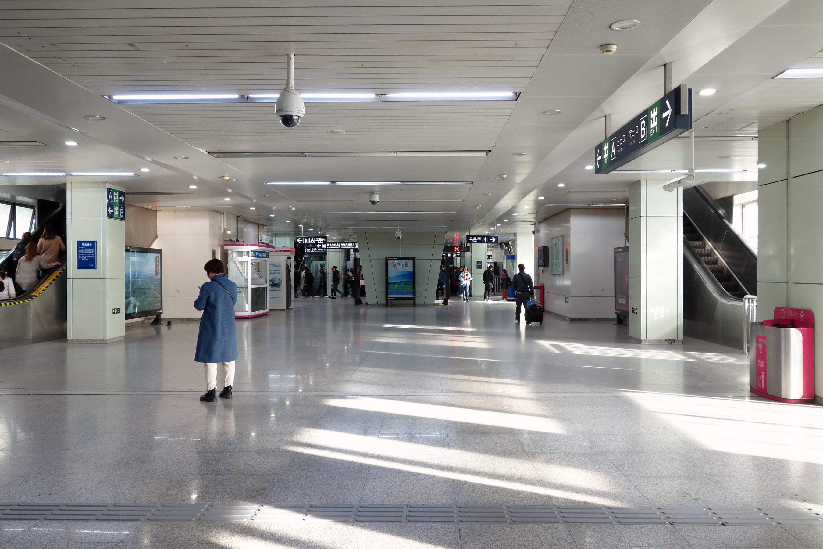 北京地铁5号线天通苑站的站厅，因是开工后增加的站点，站厅内留有经装修的梯形状桥墩柱。